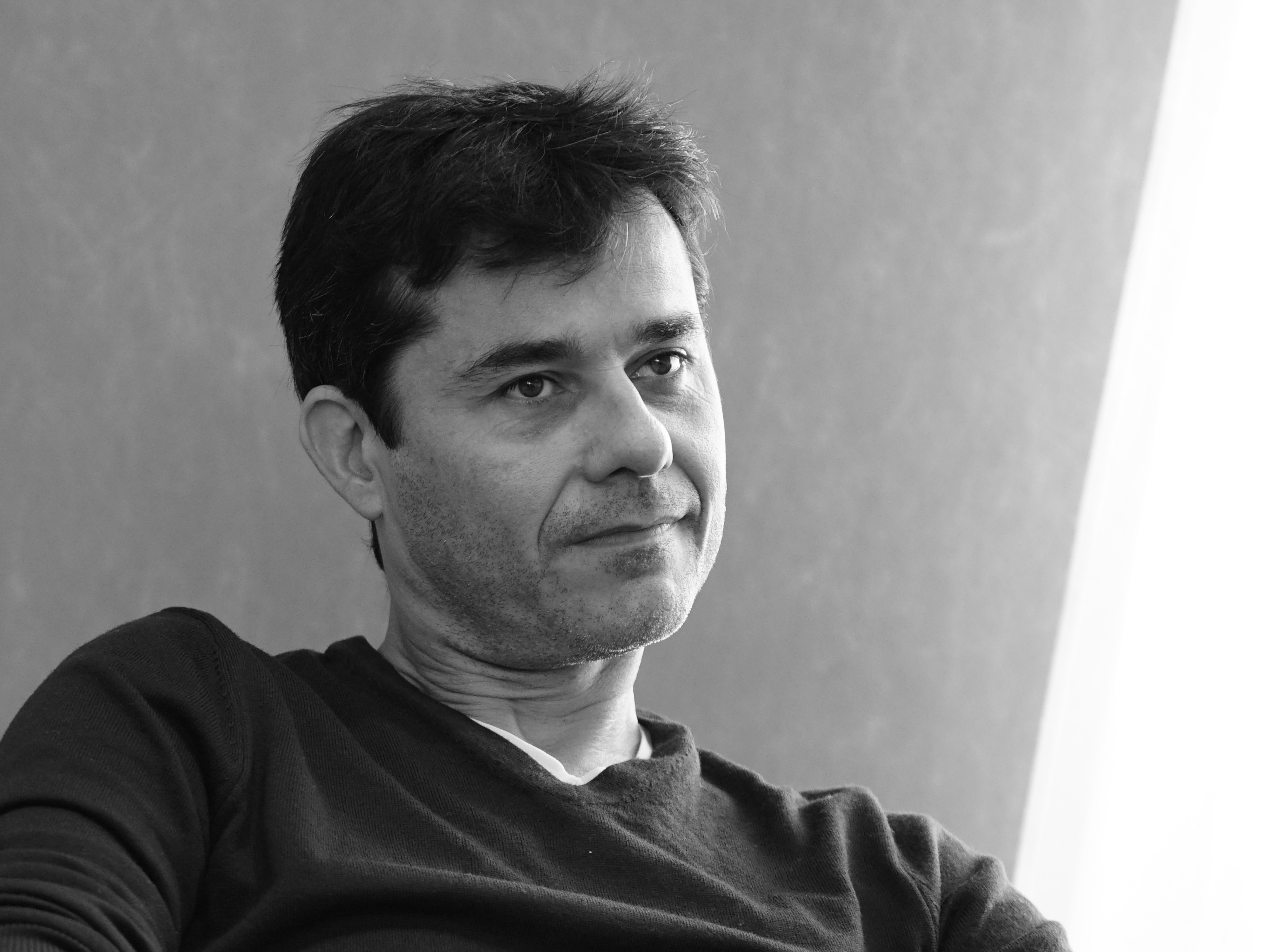 table ronde "roman de société ou société romanesque à la prefecture."